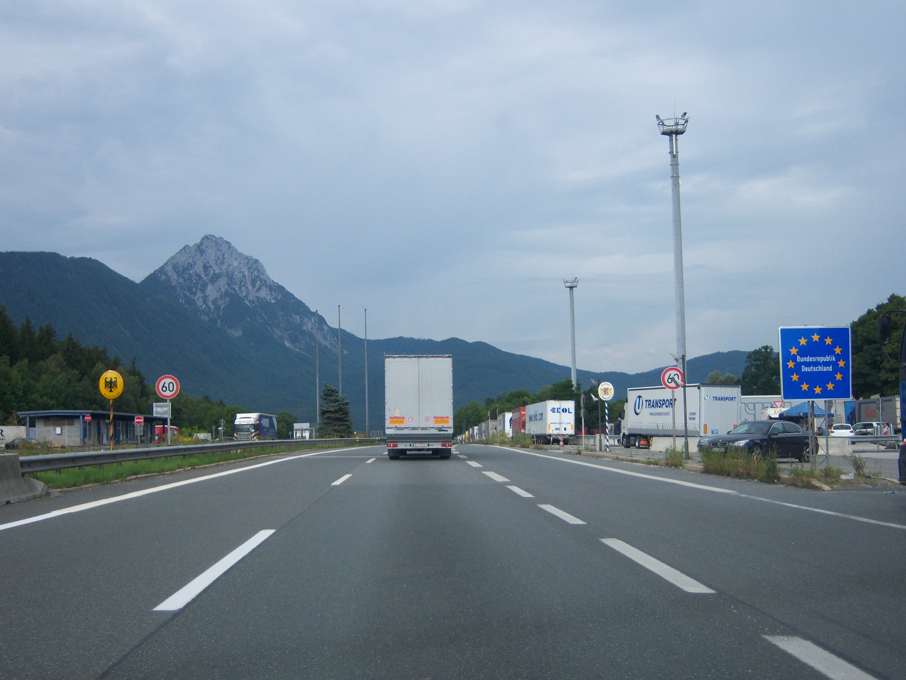 Übergang der österreichischen West Autobahn A1 (Wien-Salzburg) im Bereich des Grenzübergangs Walserberg auf die deutsche Bundesautobahn 8